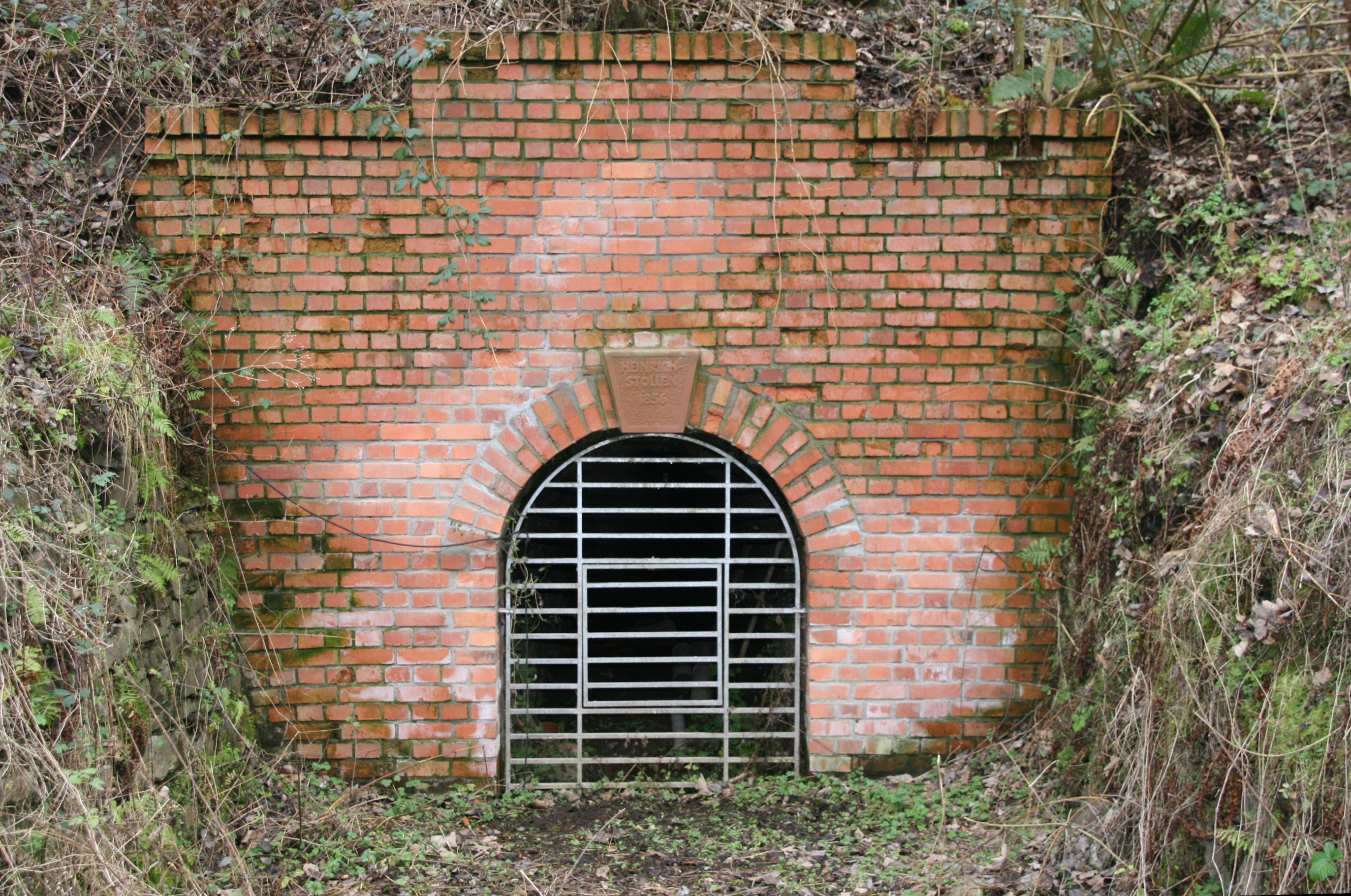 Mundloch des Heinrichstollens der Grube Friedrichssegen. Erbaut 1856. Friedrichssegen, Orteil von Lahnstein, Rheinland-Pfalz.